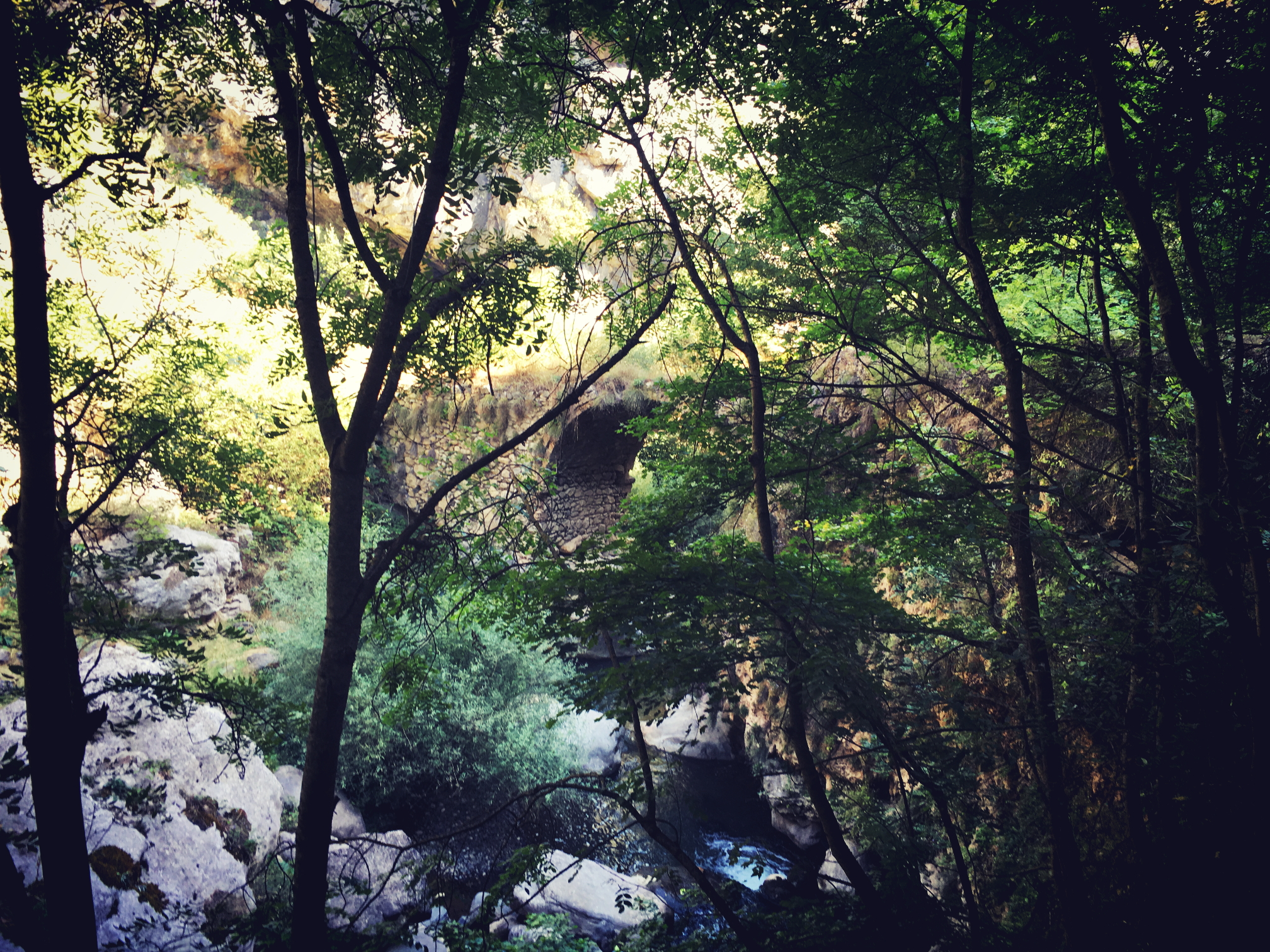 Հունոտի կամուրջ